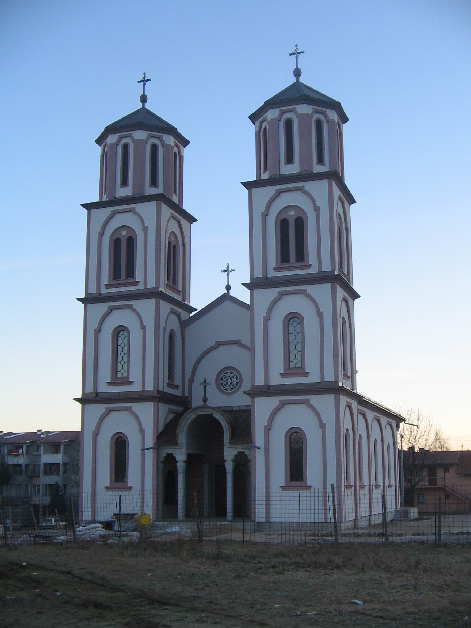 Црква Св. Василија Острошког (Обиличево,_Бања_Лука).